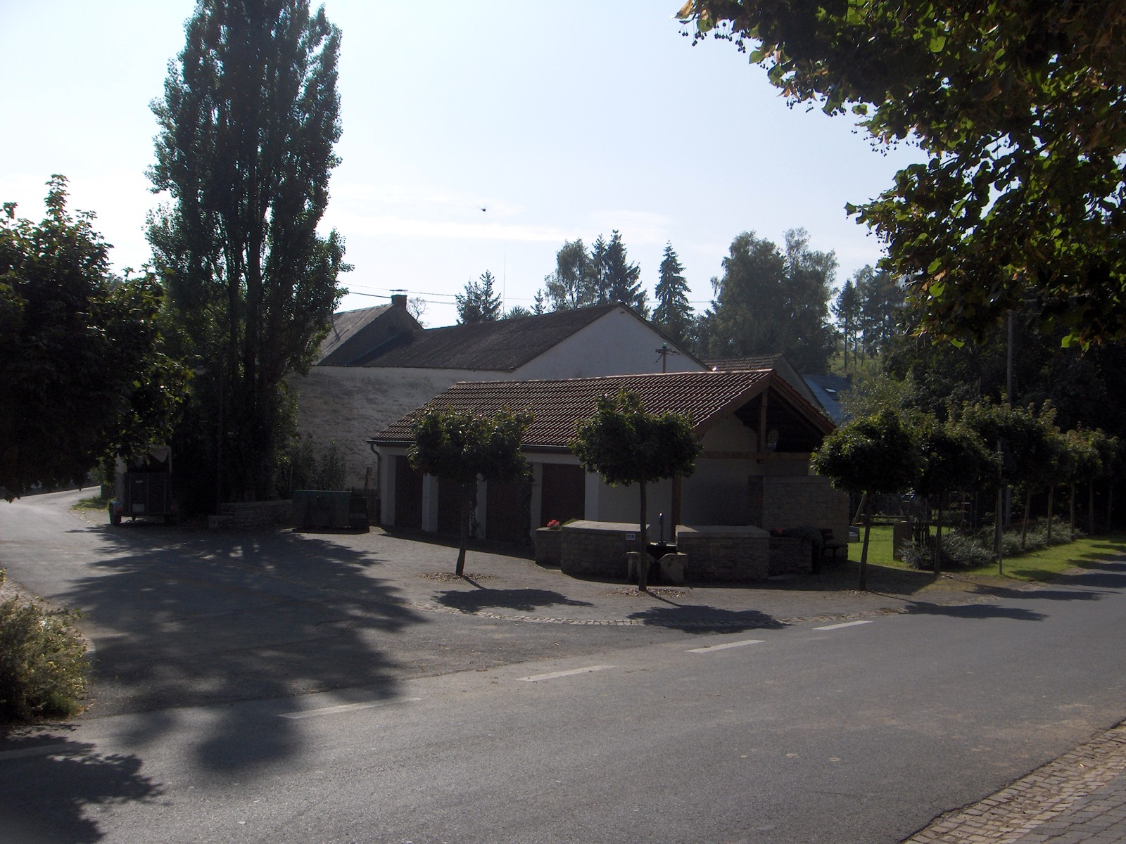 Dorfkern von Halsdorf mit Feuerwehr, Bushaltestelle und Brunnen